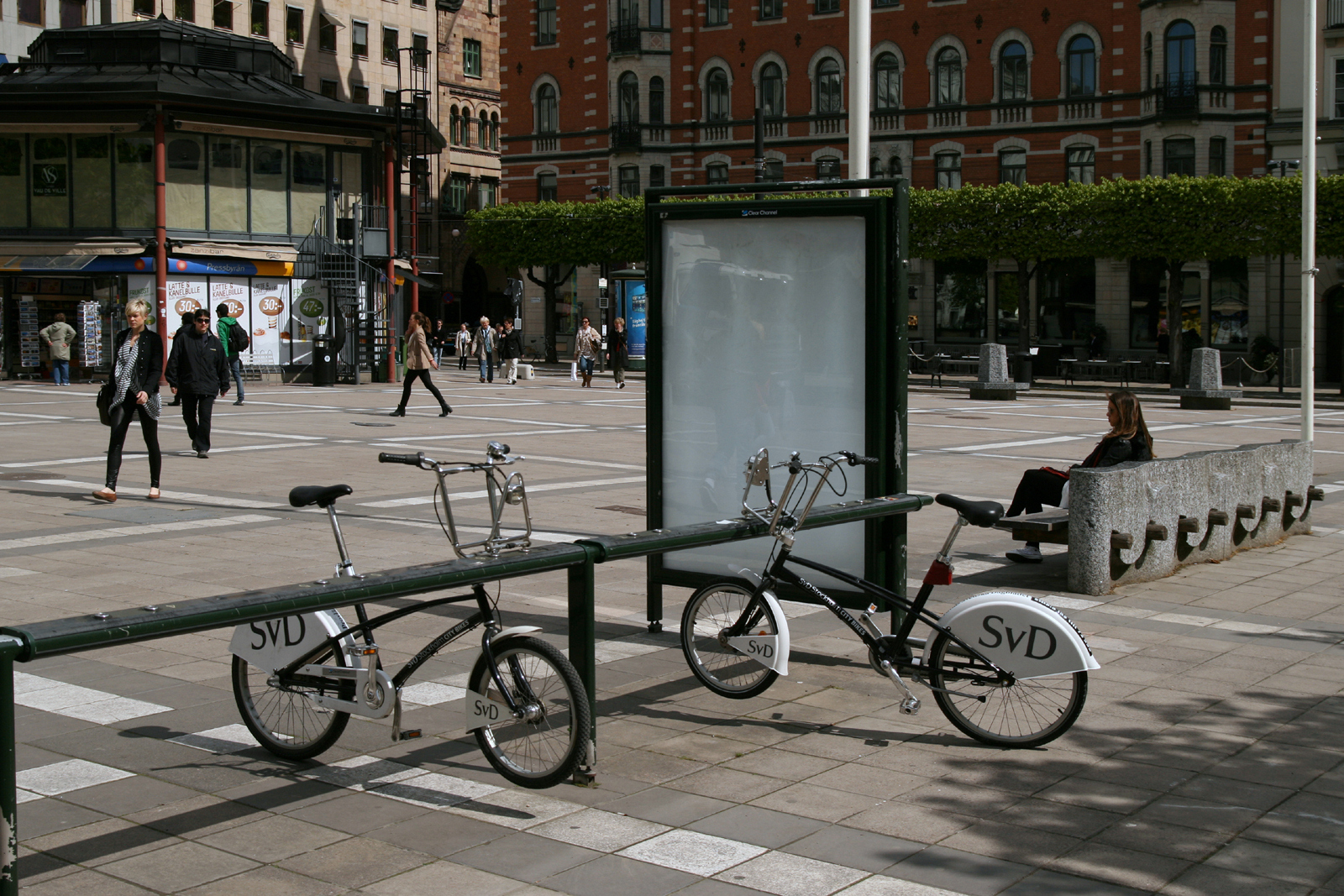 Velo SVD à Norrmalmstorg à Stockholm